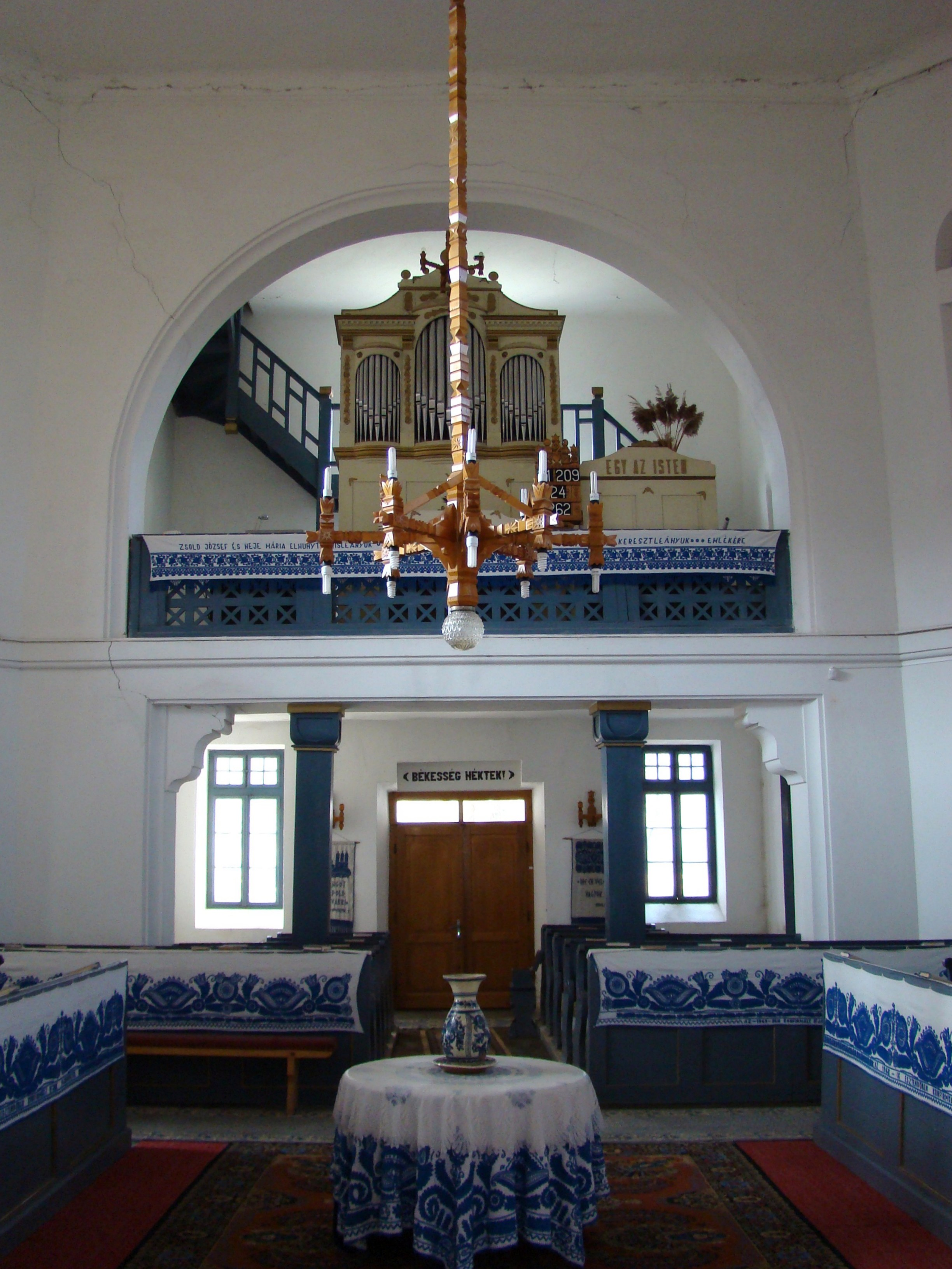 Biserica unitariană, sat Deleni, comuna BĂGACIU